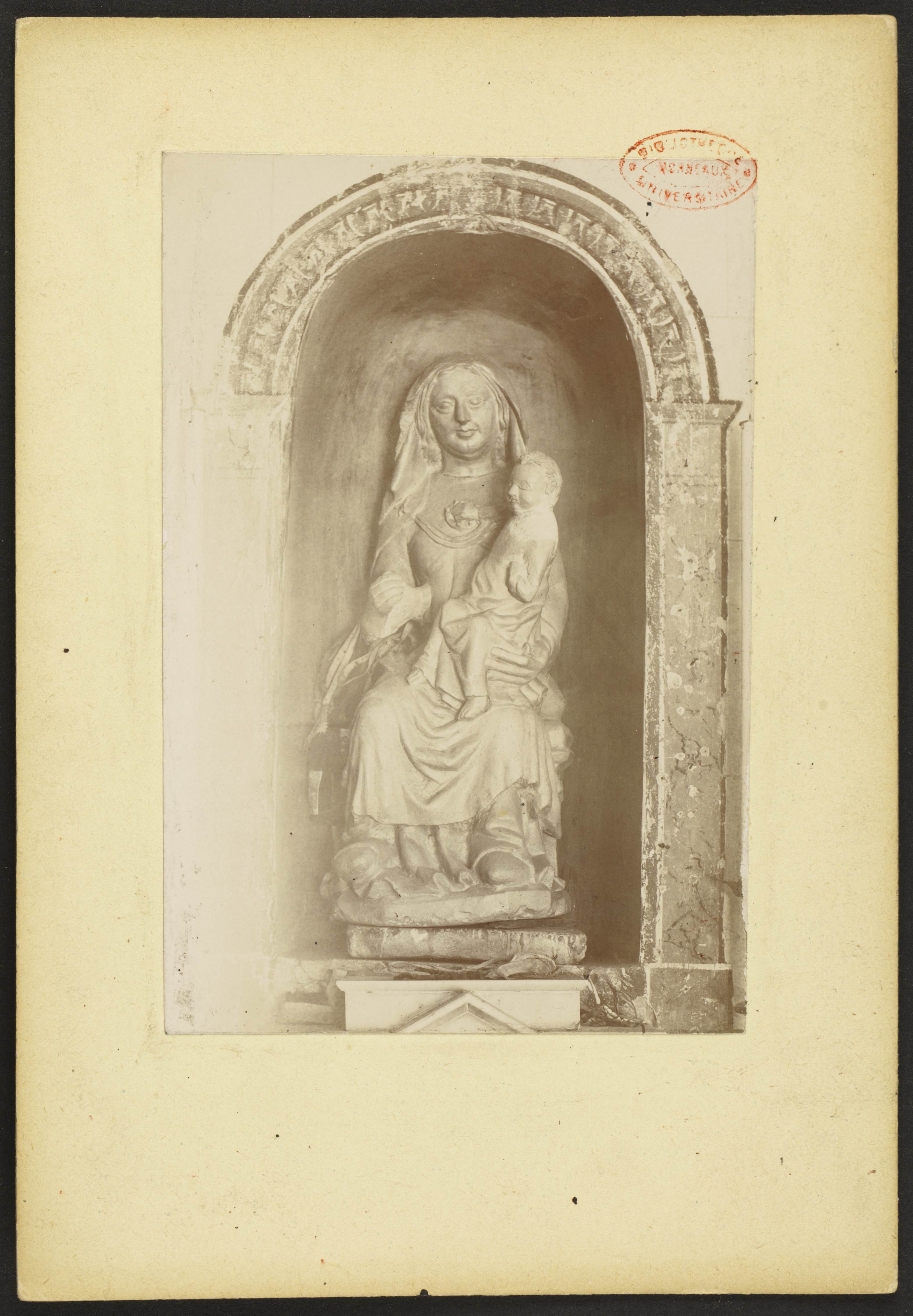 vierge et enfant ; sujet : Lados